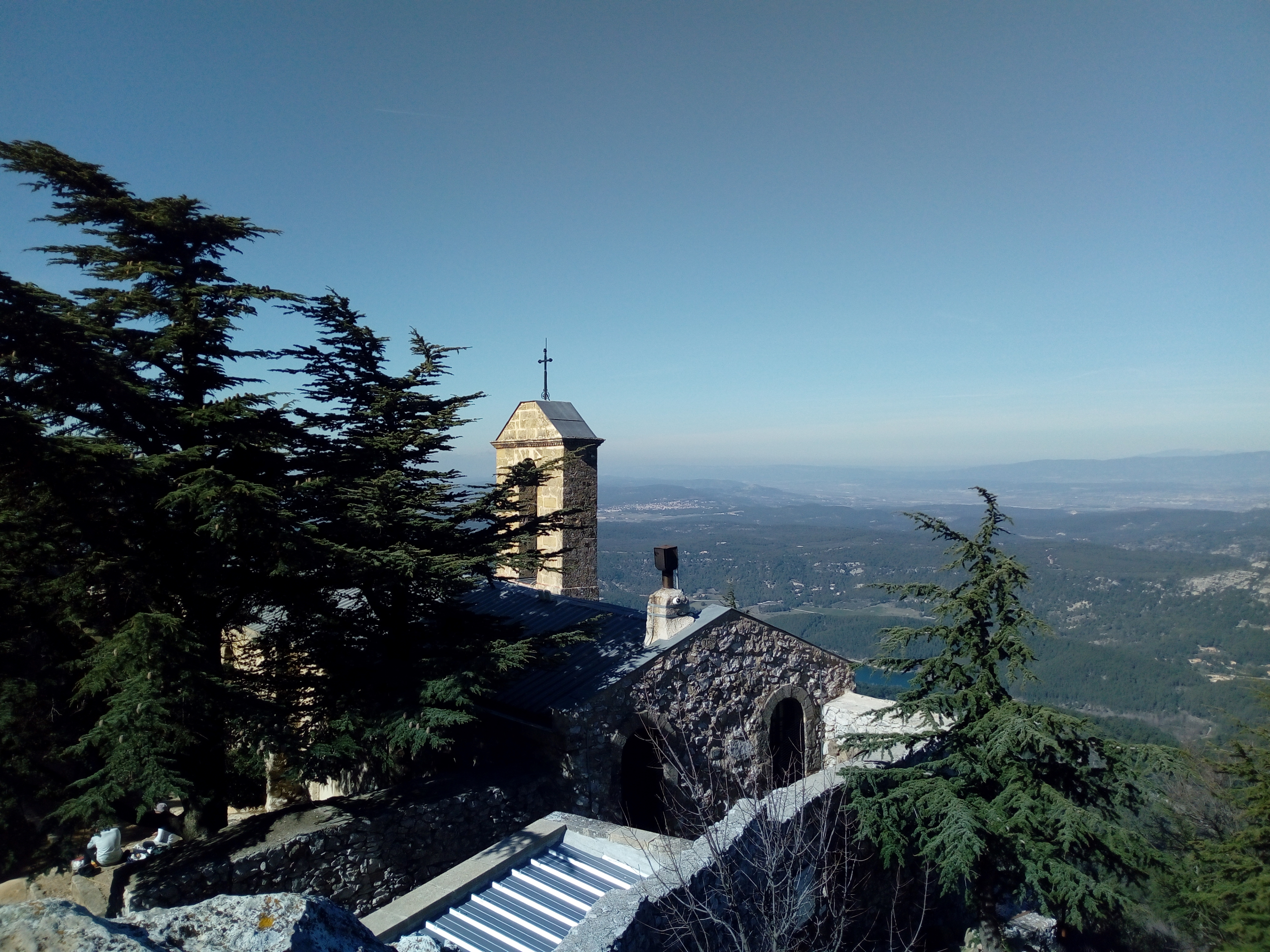 Prieuré de Sainte-Victoire en 2020.